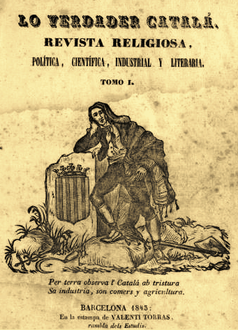 pàgina 1 del primer volum: apareix el títol i el subtítol de la capçalera acompanyat d’un dibuix que simbolitza el patriotisme de l’època. Es tracta d’un pagès amb indumentària de festes, amb la barretina, i dels símbols de Catalunya, l’escut amb les quatre barres, i de la producció catalana, una aixada, una falç i un caduceu al terra que signifiquen la ruïna de les fonts de riquesa. Al dibuix l’acompanyen uns versos alusius: “Per terra observa l’Catalá ab tristura Sa indústria, son comerç y agricultura”. Aquest rodolí és com un lema de la campanya econòmica empresa per Lo verdader Catalá